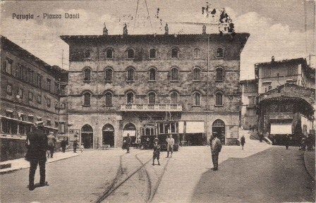 Perugia - Piazza Danti con tram